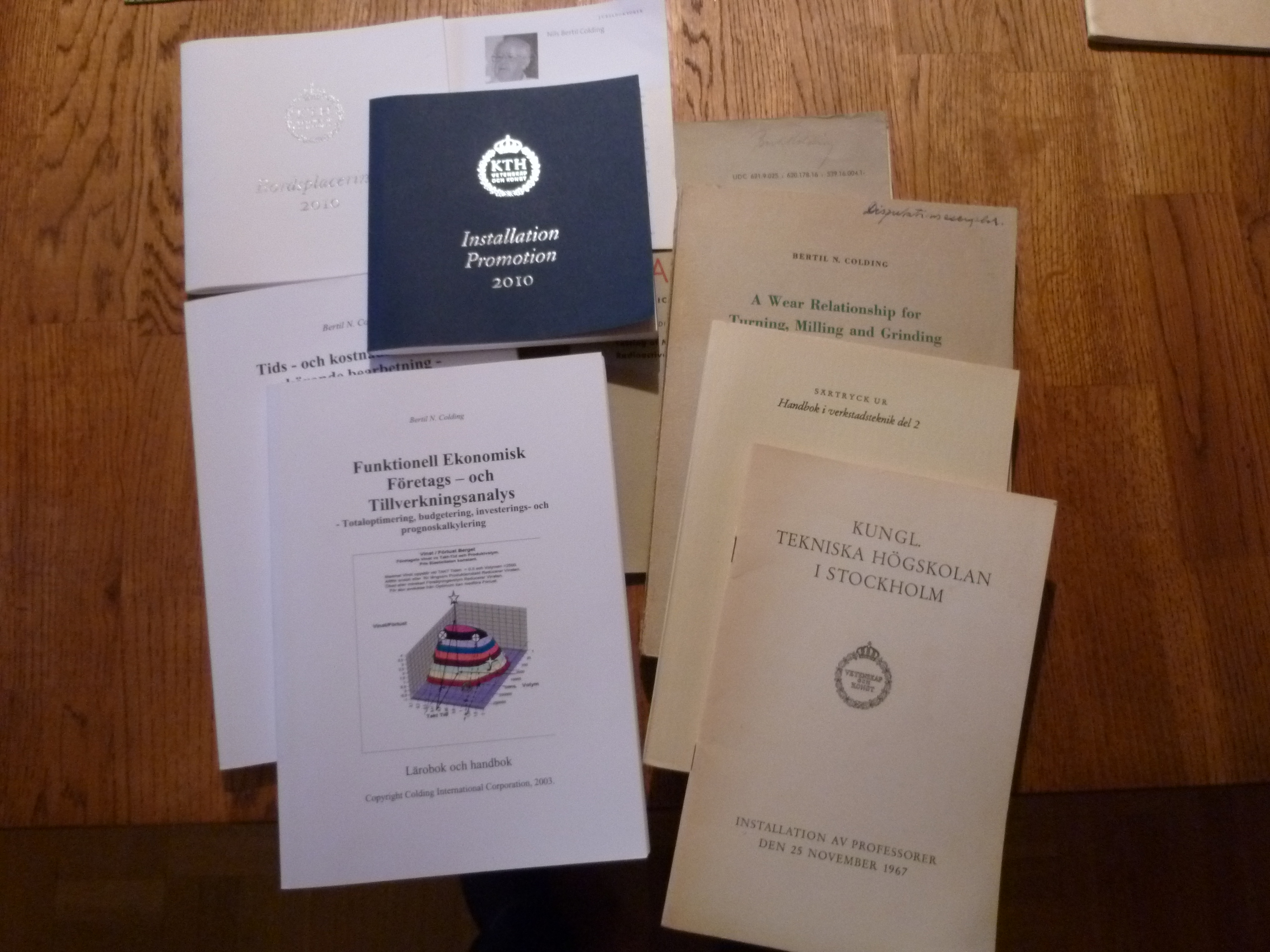 Publicering av några verk av Bertil Colding